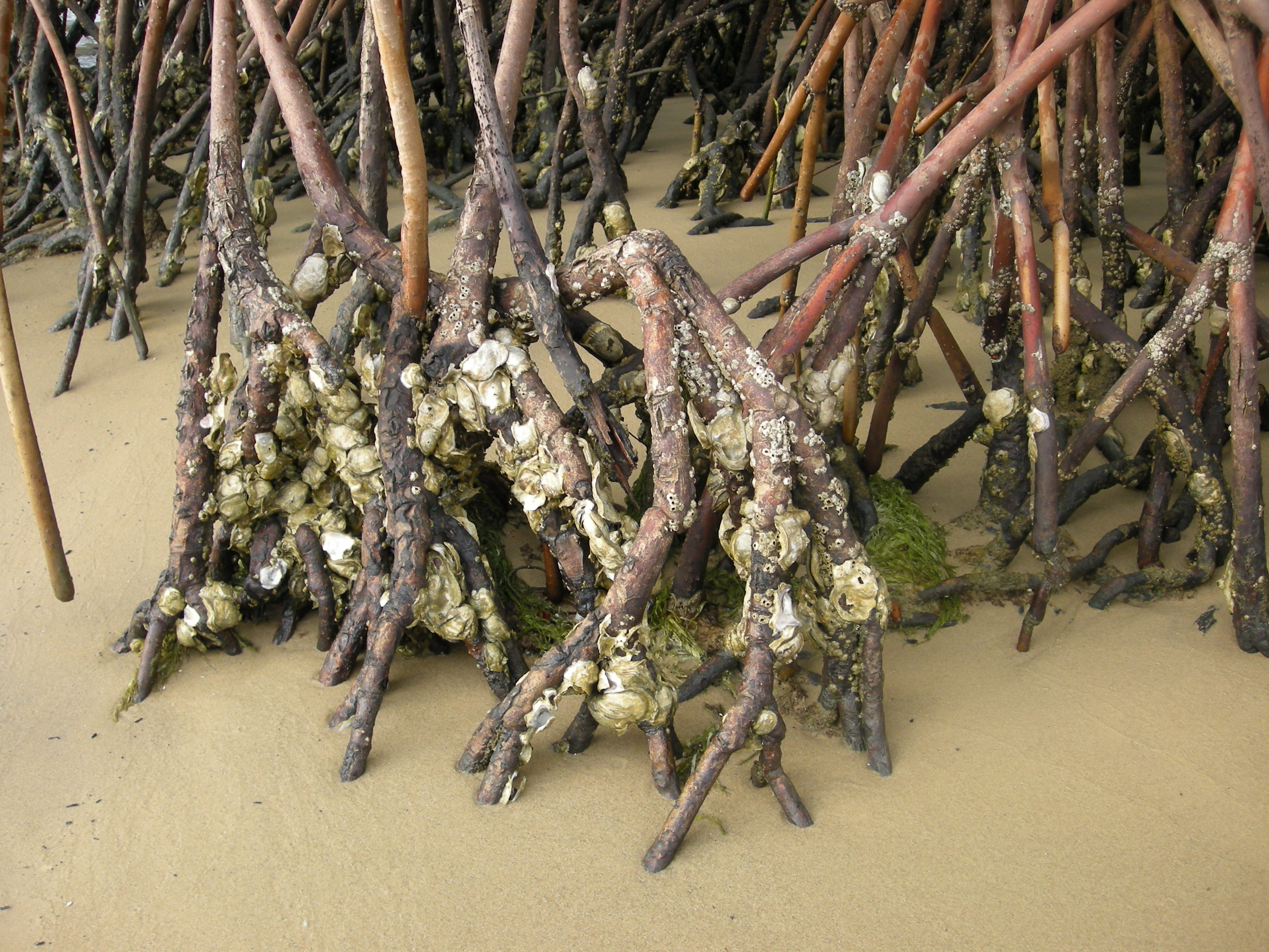 Huîtres de palétuviers dans une mangrove de Carabane (Casamance, Sénégal)